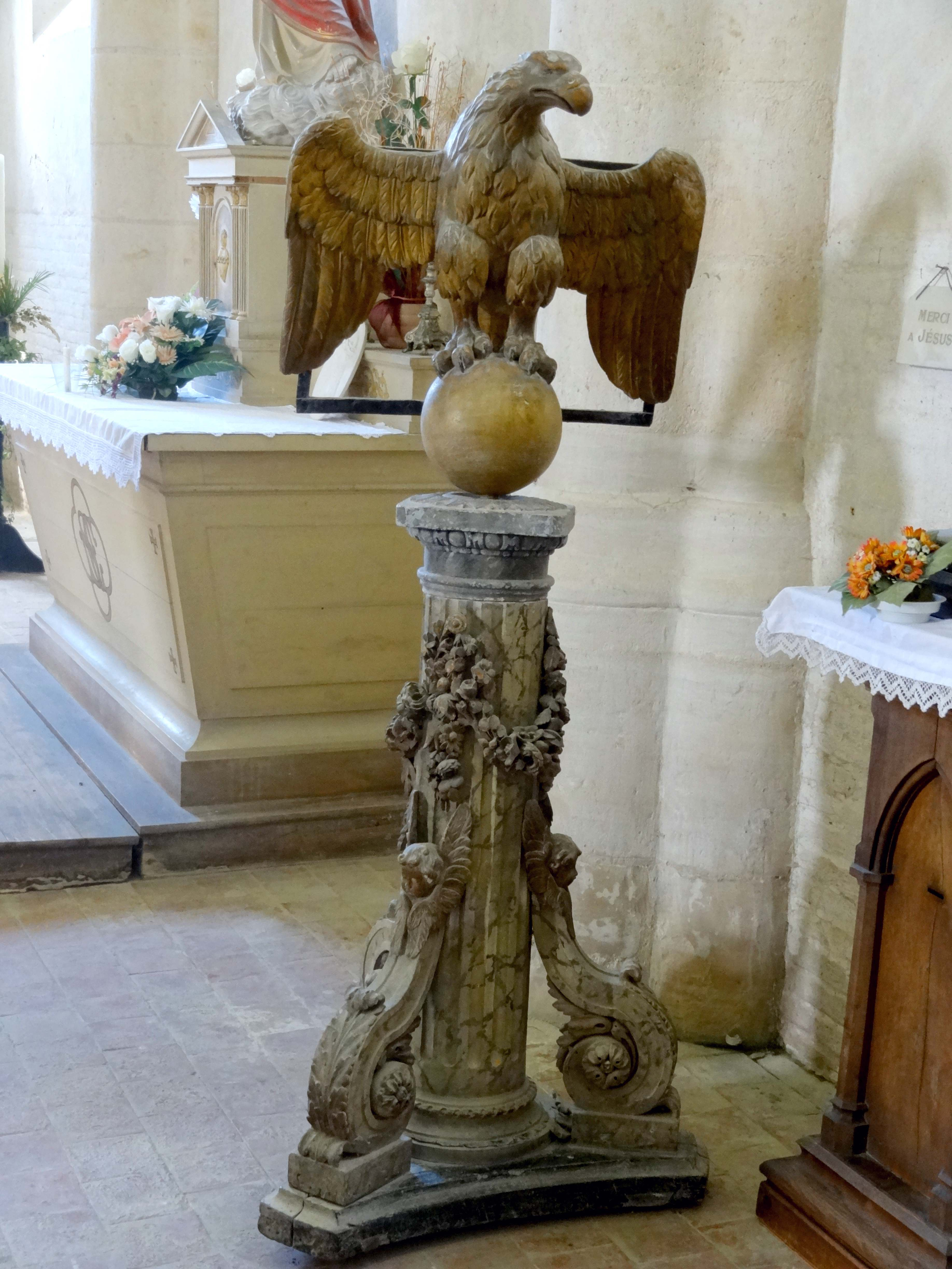 Mobilier de l'église - voir titre.